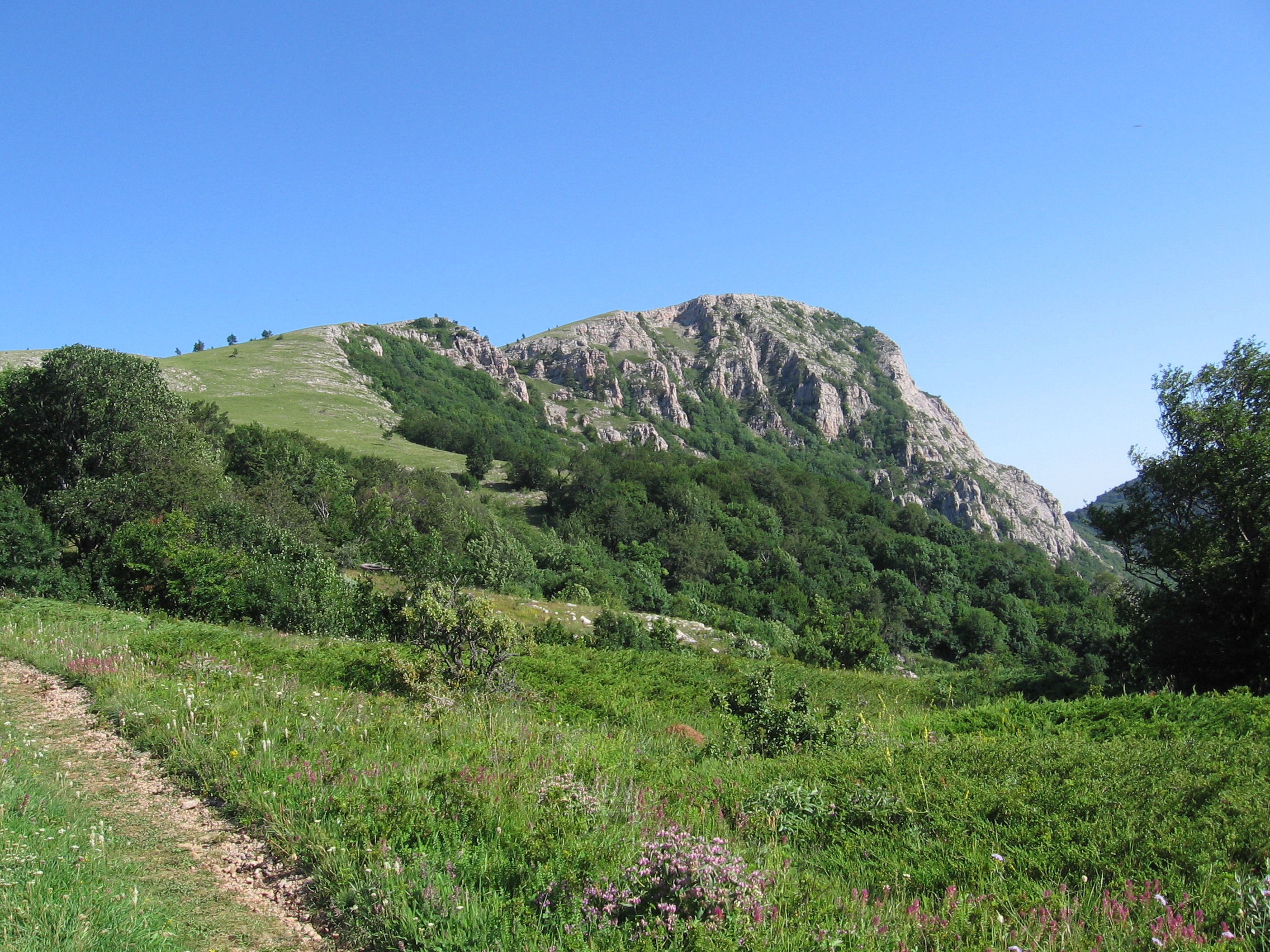 Фото